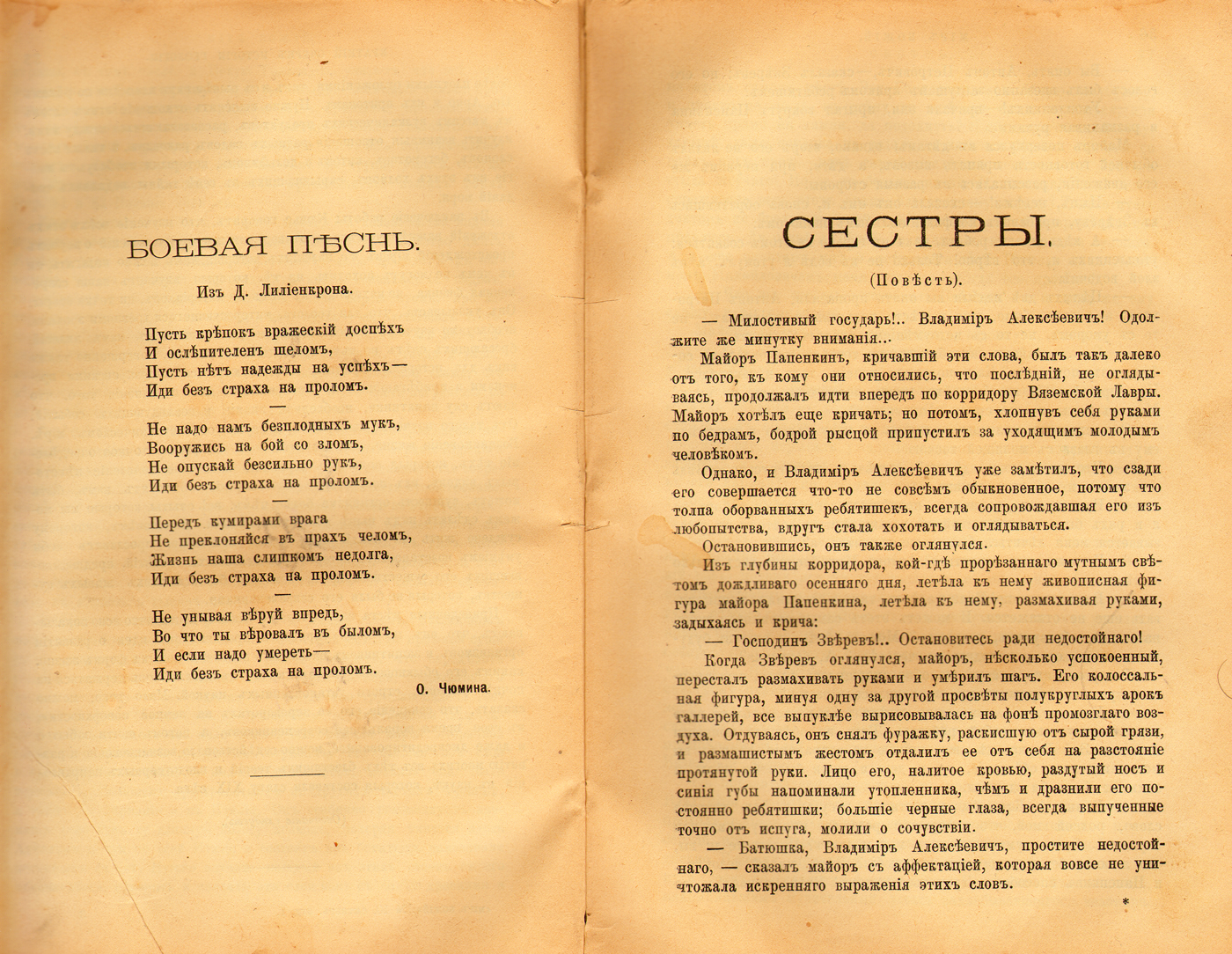 Стихотворение Ольги Чюминой и повесть Юлии Безродной "Сёстры" в журнале "Мир Божий", 1901, октябрь